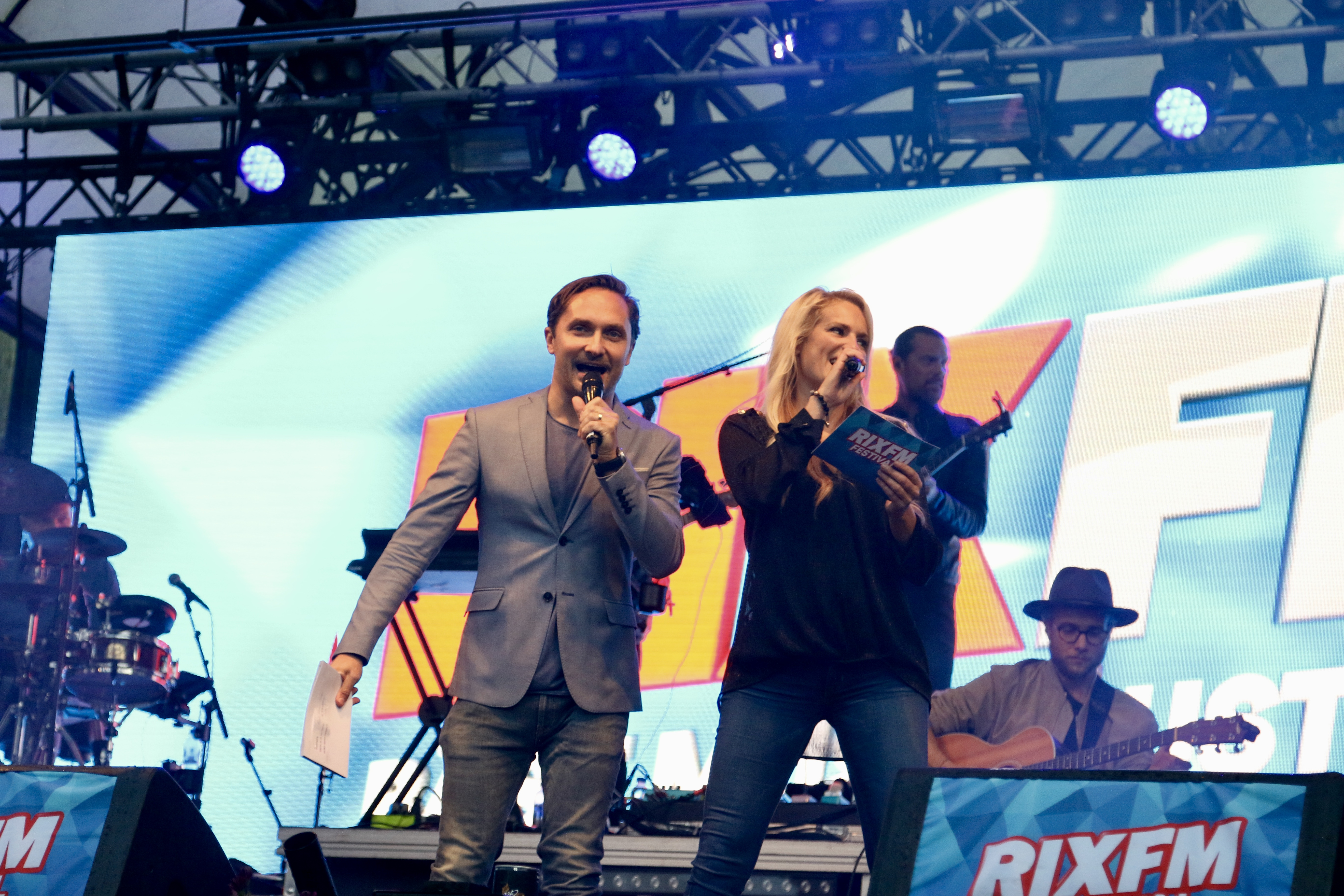 Roger och Laila på RIX FM Festival i Stockholm 2018. Fotograf: Sebastian Voght